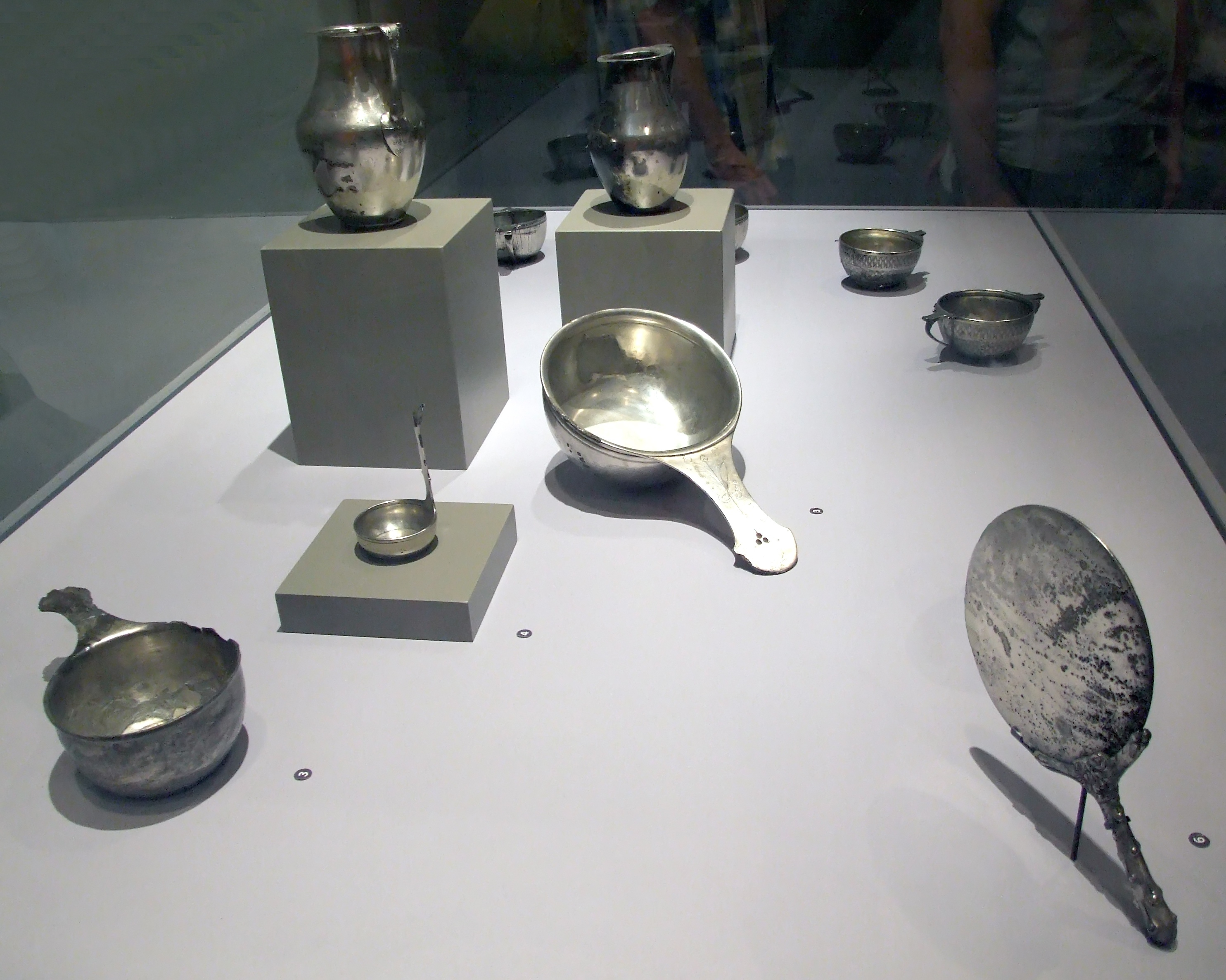 Silberschatz aus Pompeji, 79 n.Chr., aufgenommen während der Pompeji-Ausstellung, Europäischer Kulturpark Bliesbruck-Reinheim, Sommer 2007